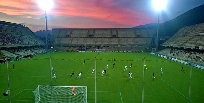 Salernitana - Nuova Cosenza del 31/08/2014